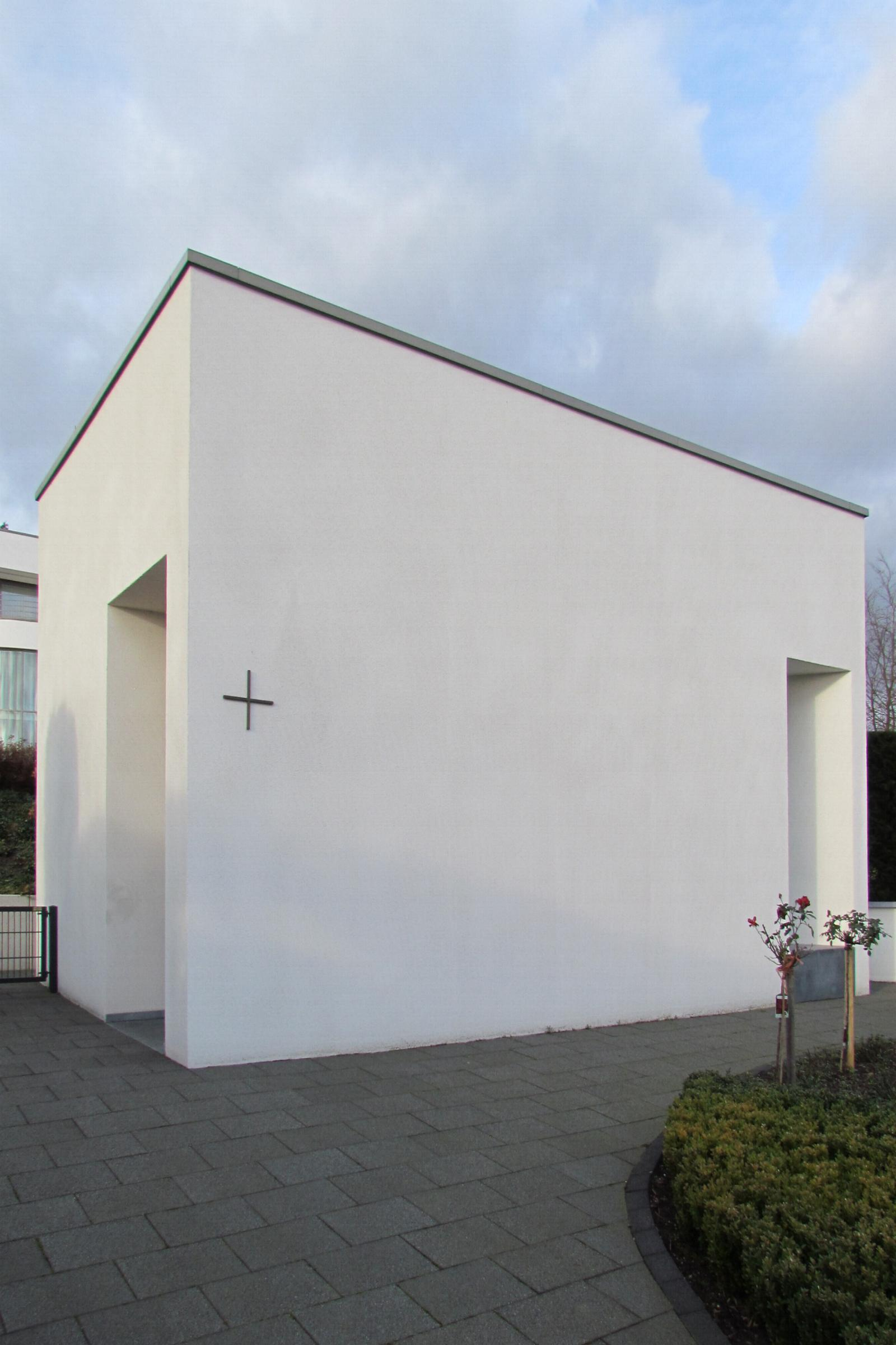 Kirchen und Kapellen in der Stadt Geilenkirchen